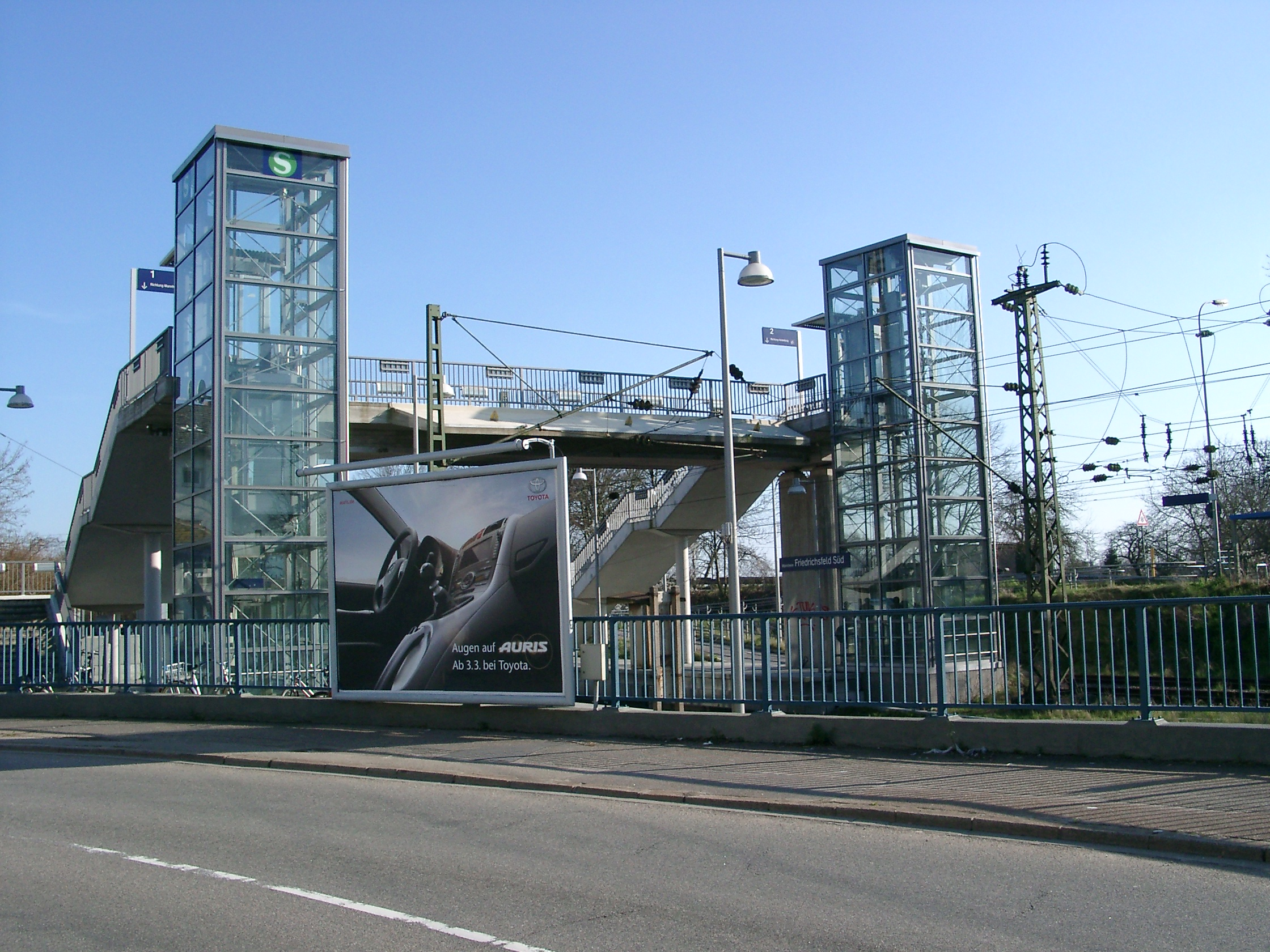 Mannheim-Friedrichsfeld, S-Bahnhof Friedrichsfeld Süd